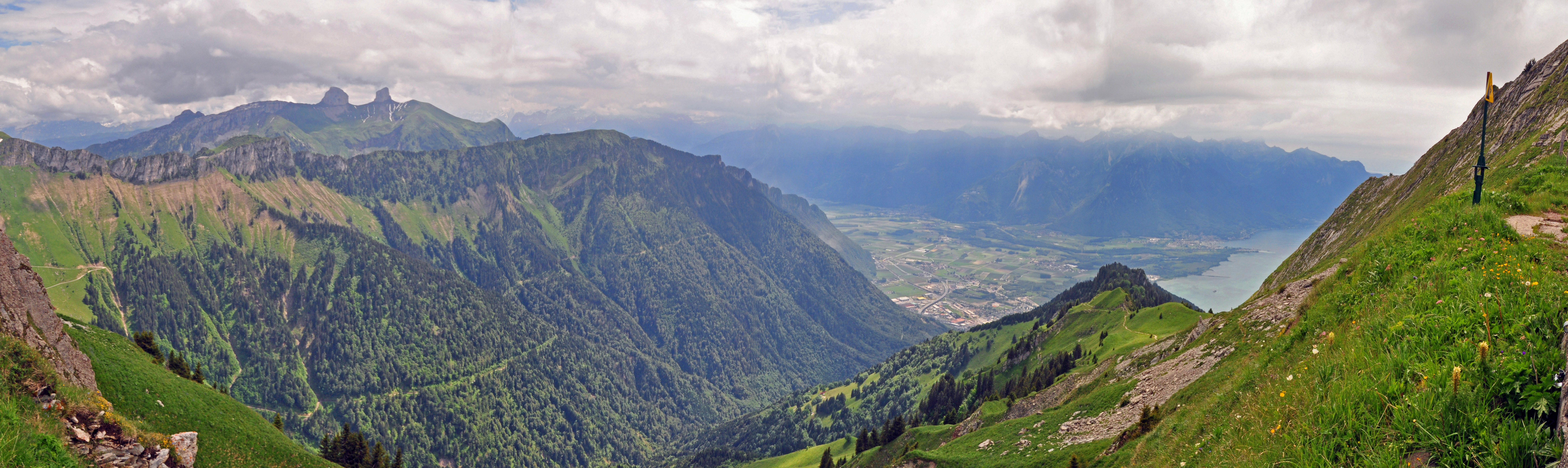 Panorámica desde los Rochers de Naye